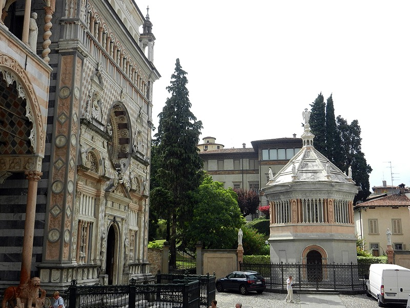 Bergamo - Battistero